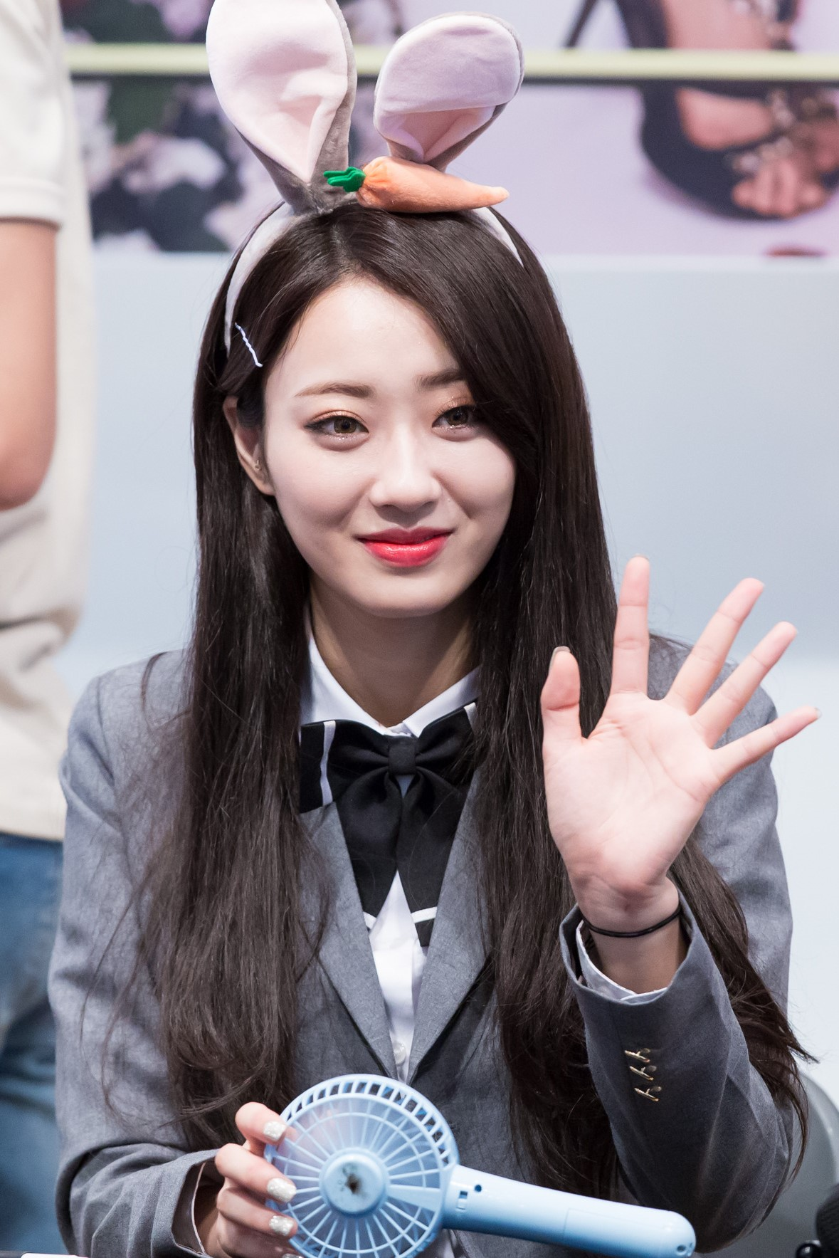 한국어 (조선): 170709 킨텍스 팬사인회 나인뮤지스